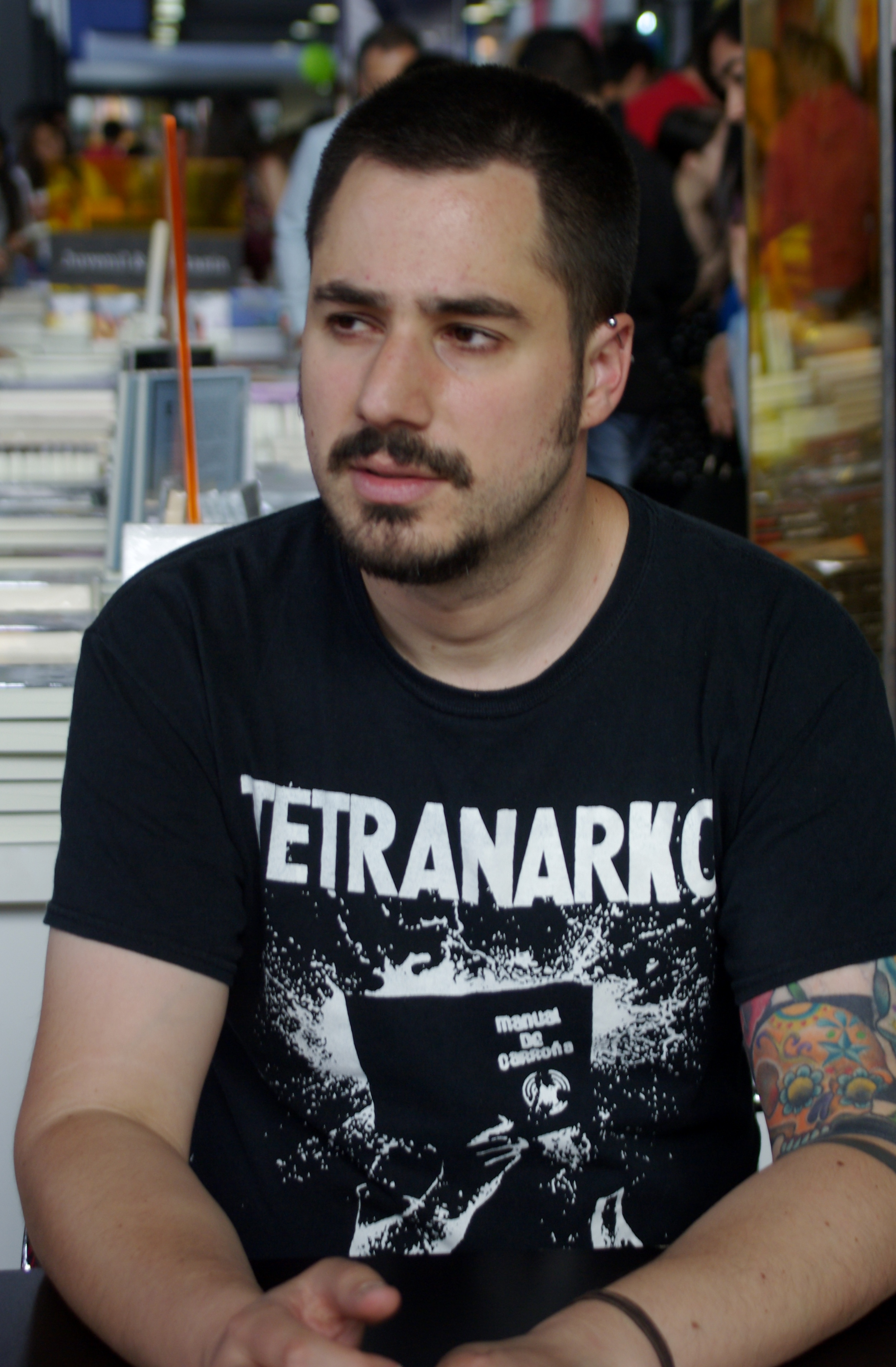 El dibujante chileno Malaimagen (Guillermo Galindo) en el stand de çPenguin Random House durante una sesión de firma de libros en la Feria Internacional del Libro de Santiago 2016